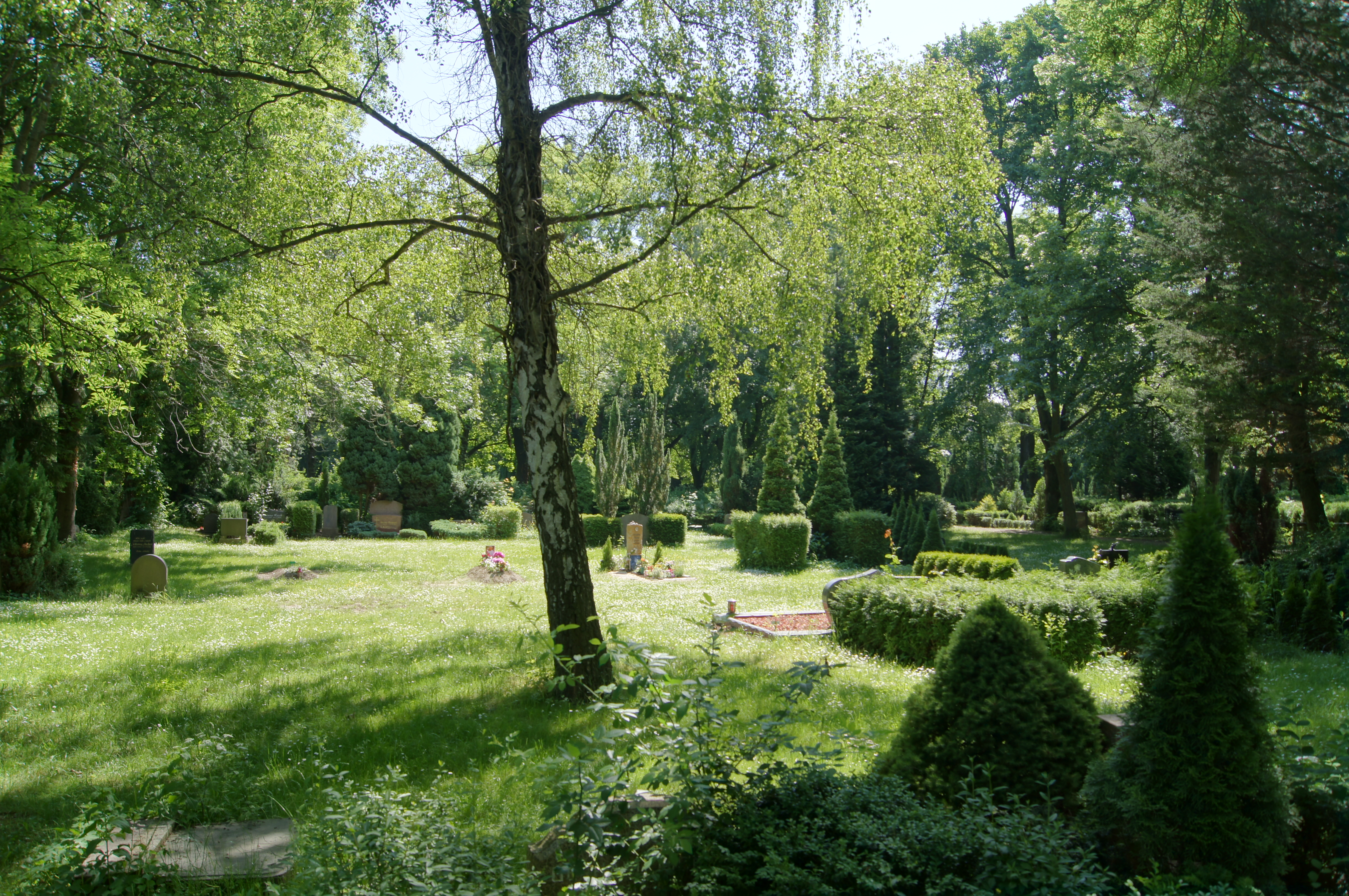 Friedhof der Auferstehungsgemeinde in Berlin-Weißensee